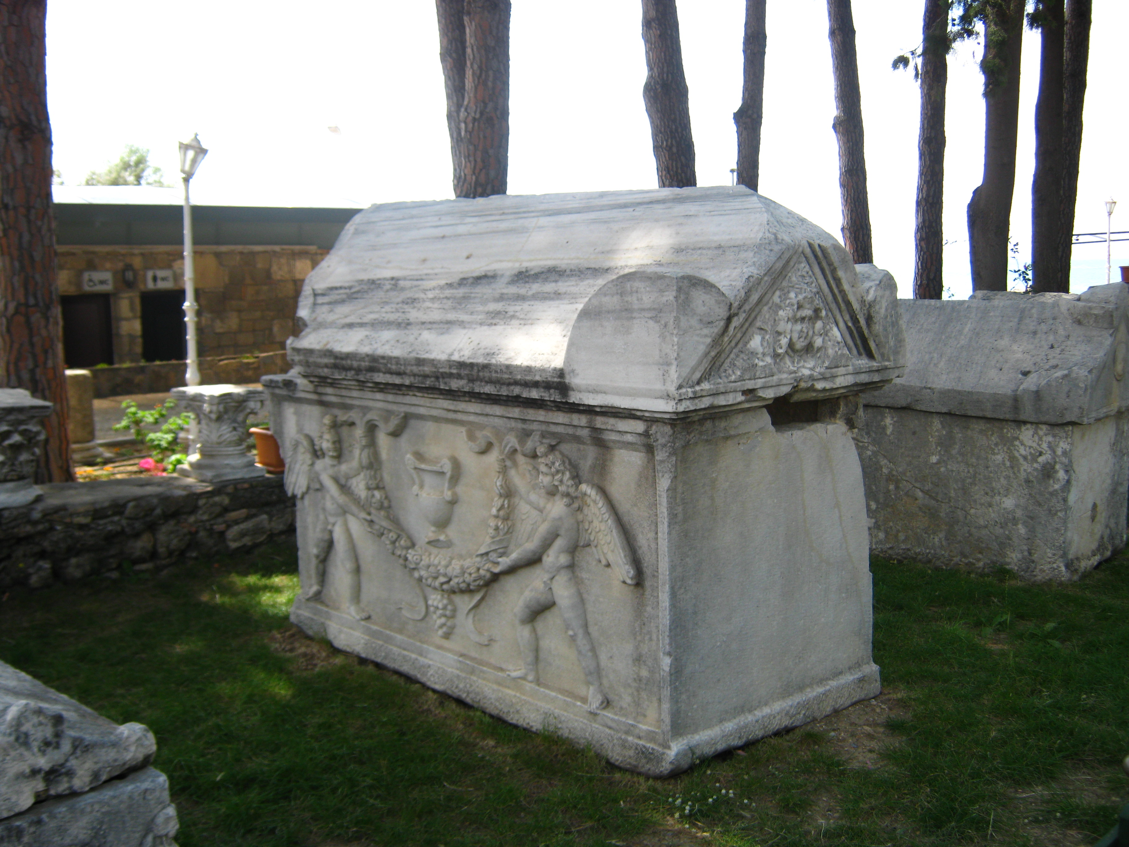 Саркофаг давньоримського періоду